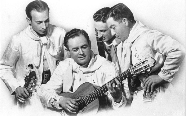 Los Trovadores de Cuyo